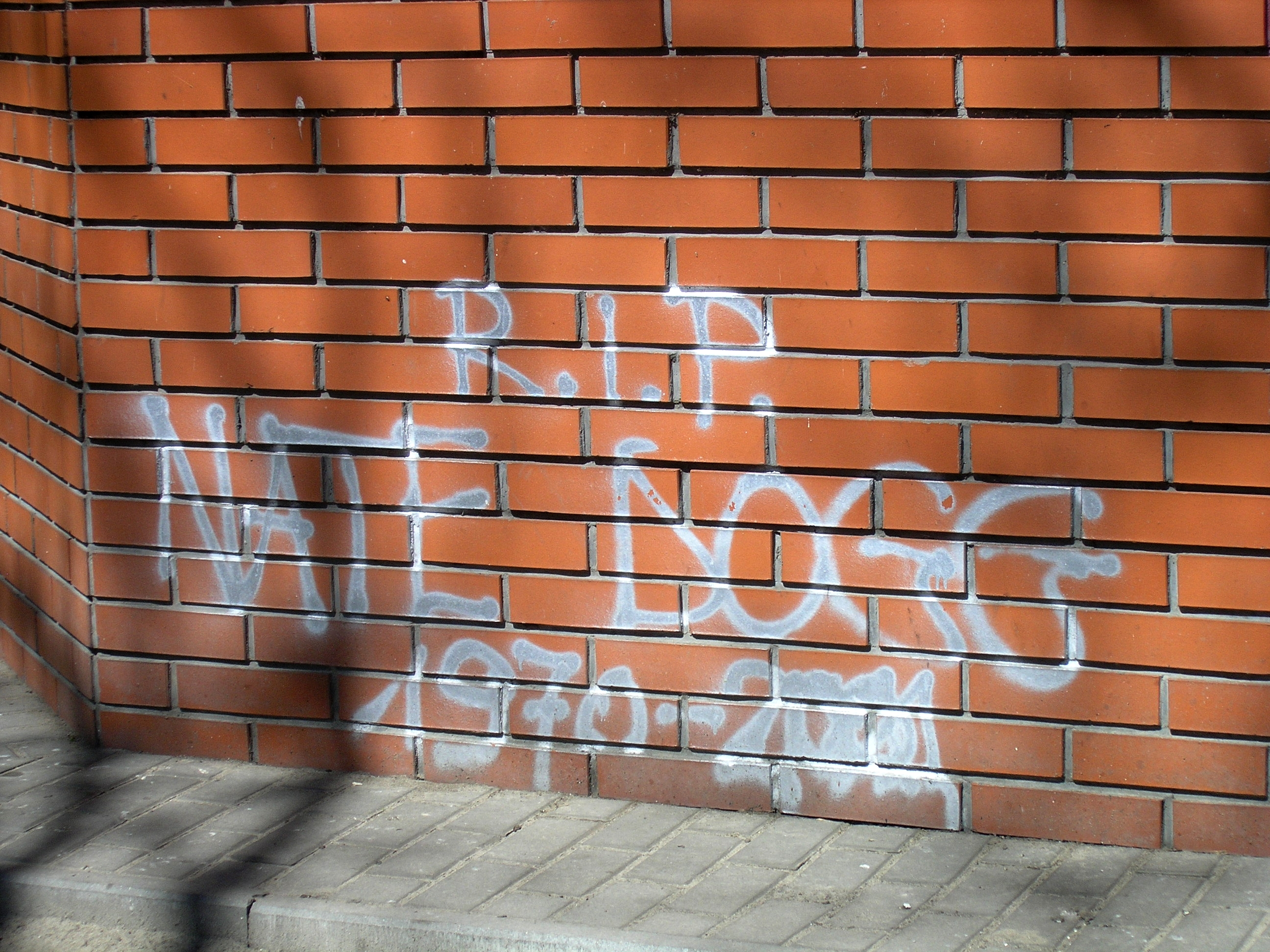 Graffiti upamiętniające Nate Dogga na ujściu wody oligoceńskiej przy skrzyżowaniu al. Solidarności i ul. Żelaznej w Warszawie (Stan na kwiecień 2012)